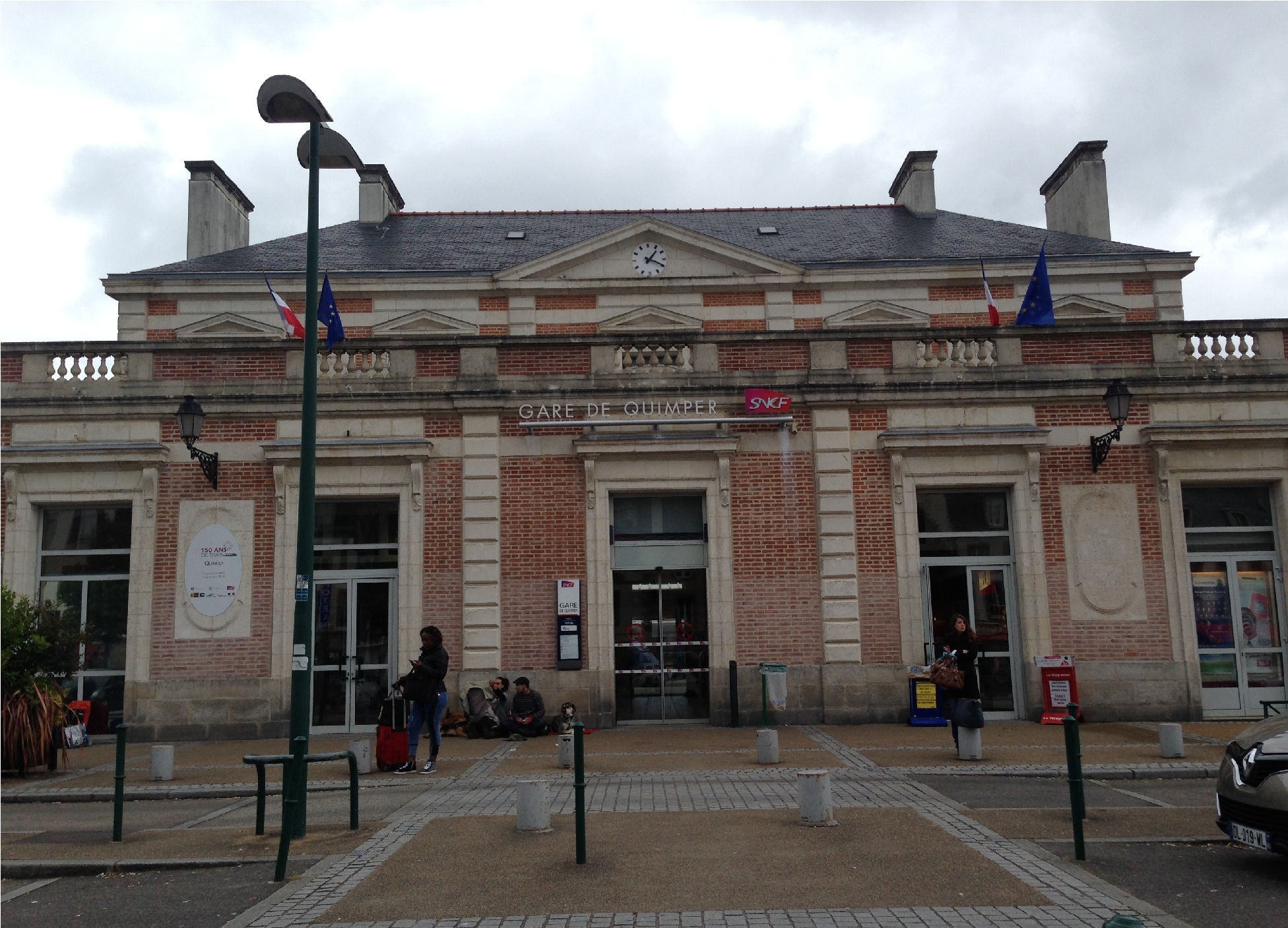 Gare de Quimper-2015